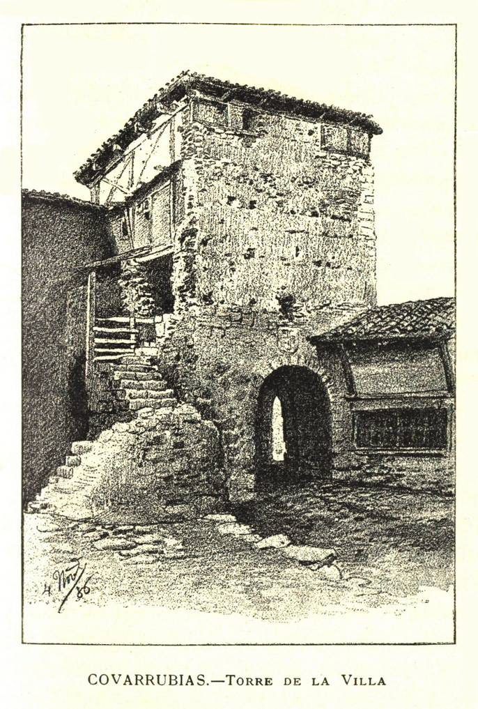 "Torre de la Villa" de Covarrubias (Burgos - España). Dibujo de Miguel Joarizti, heliografía de 11,5 x 8 cm, en hoja de 16 x 24 cm. Publicado en Barcelona: Establecimiento Tipográfico-Editorial de Daniel Cortezo y Cía; 1887.